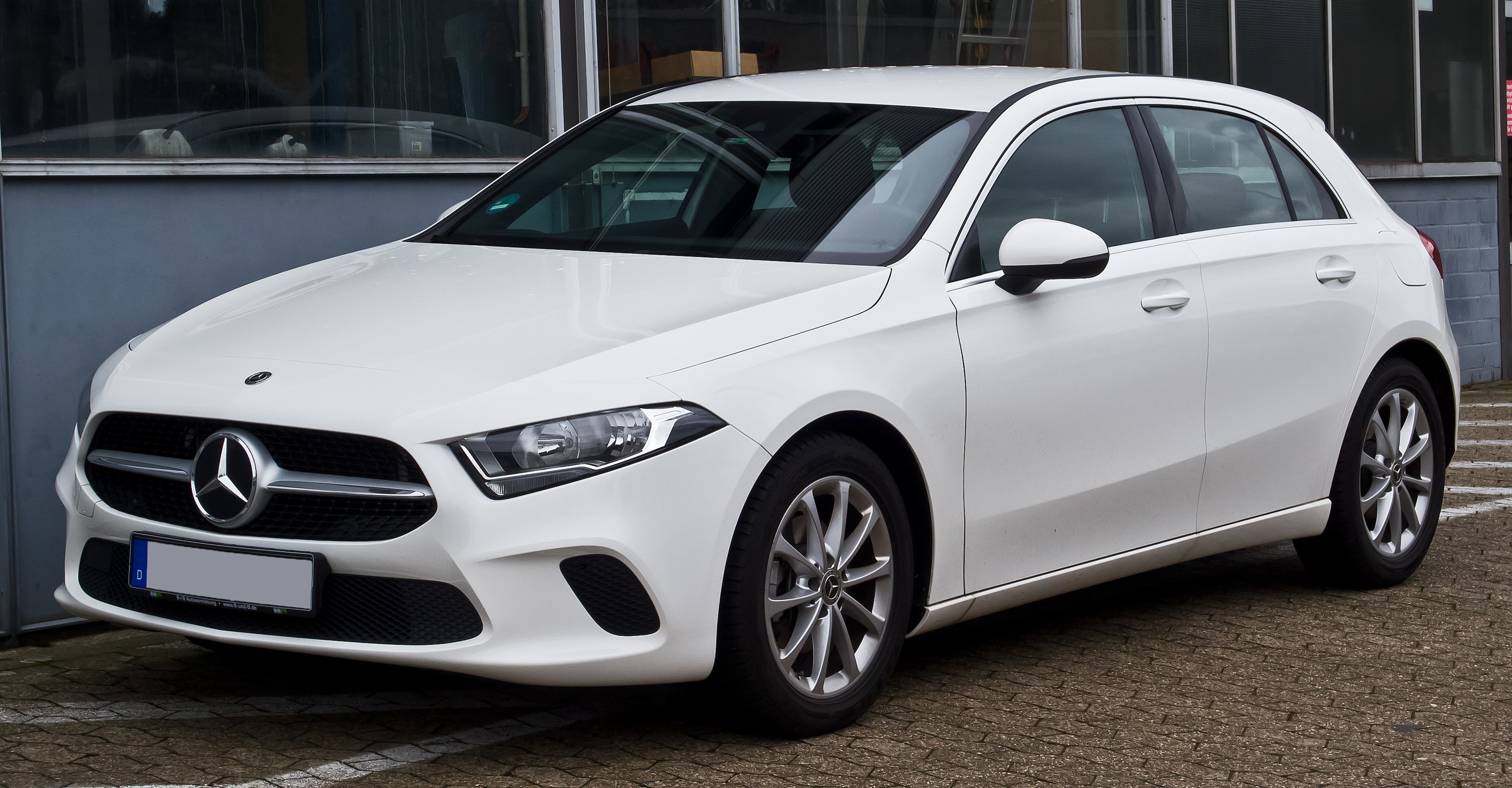 Mercedes-Benz A 180 Progressive (W 177)